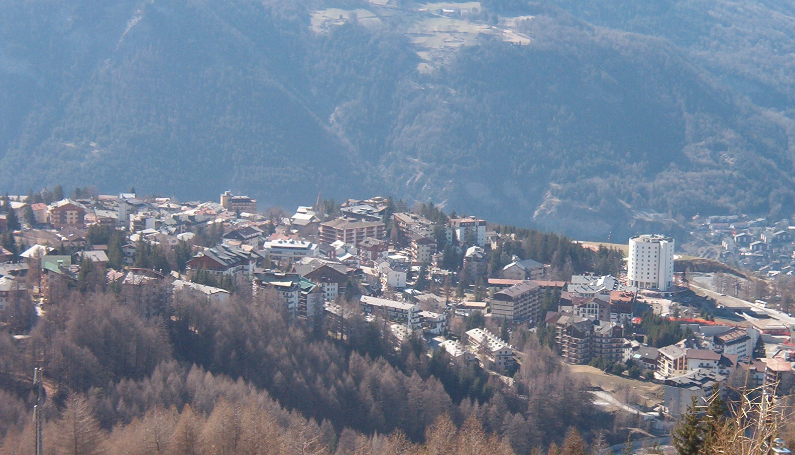 Panorma Sauze d'Oulx - provincia di Torino - Italia